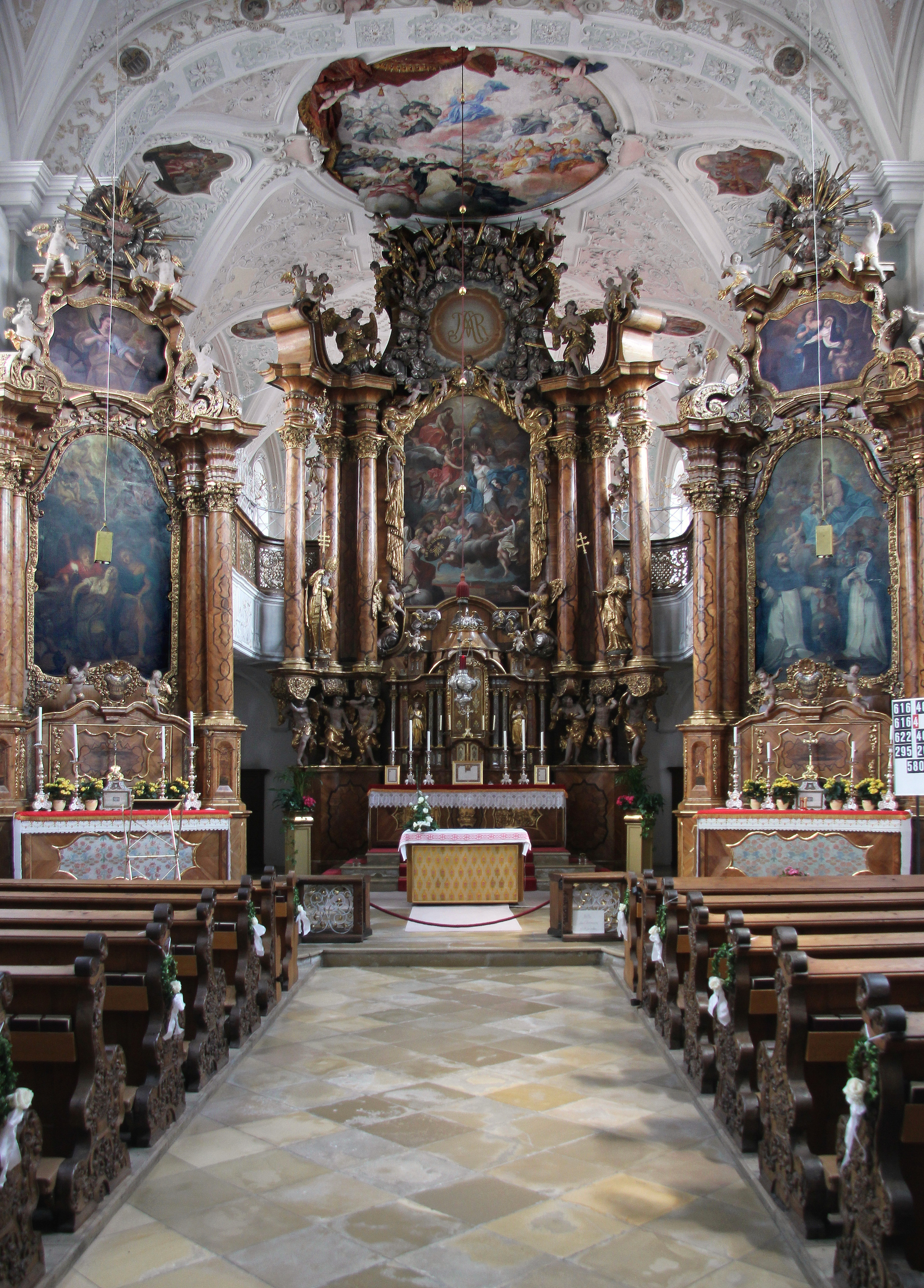 Dominikanerinnenkloster Bad Wörishofen, Innenansicht der Kirche, spätes 18. Jahrhundert